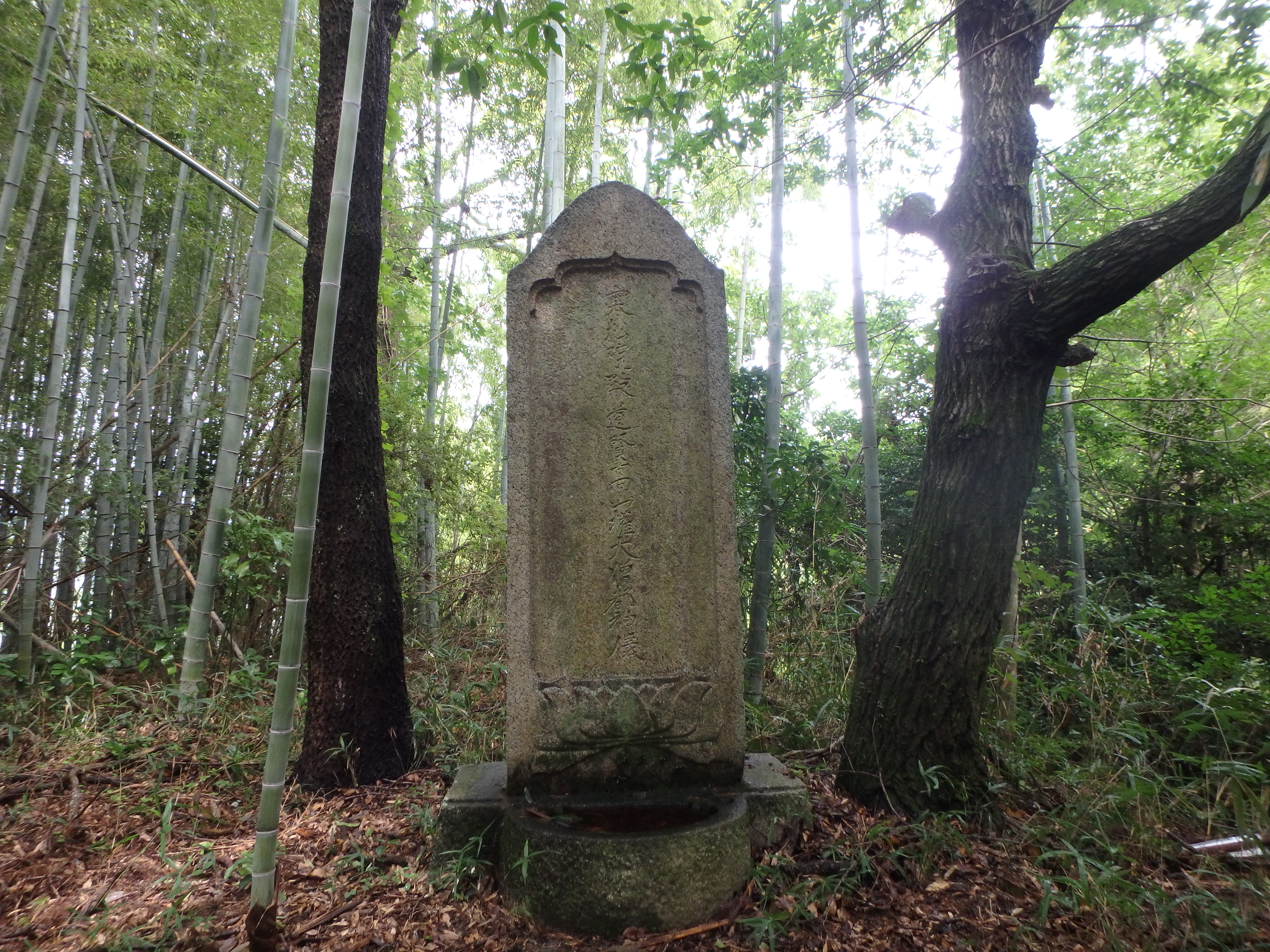 京都府木津川市加茂町にある藤堂高虎の供養碑です。